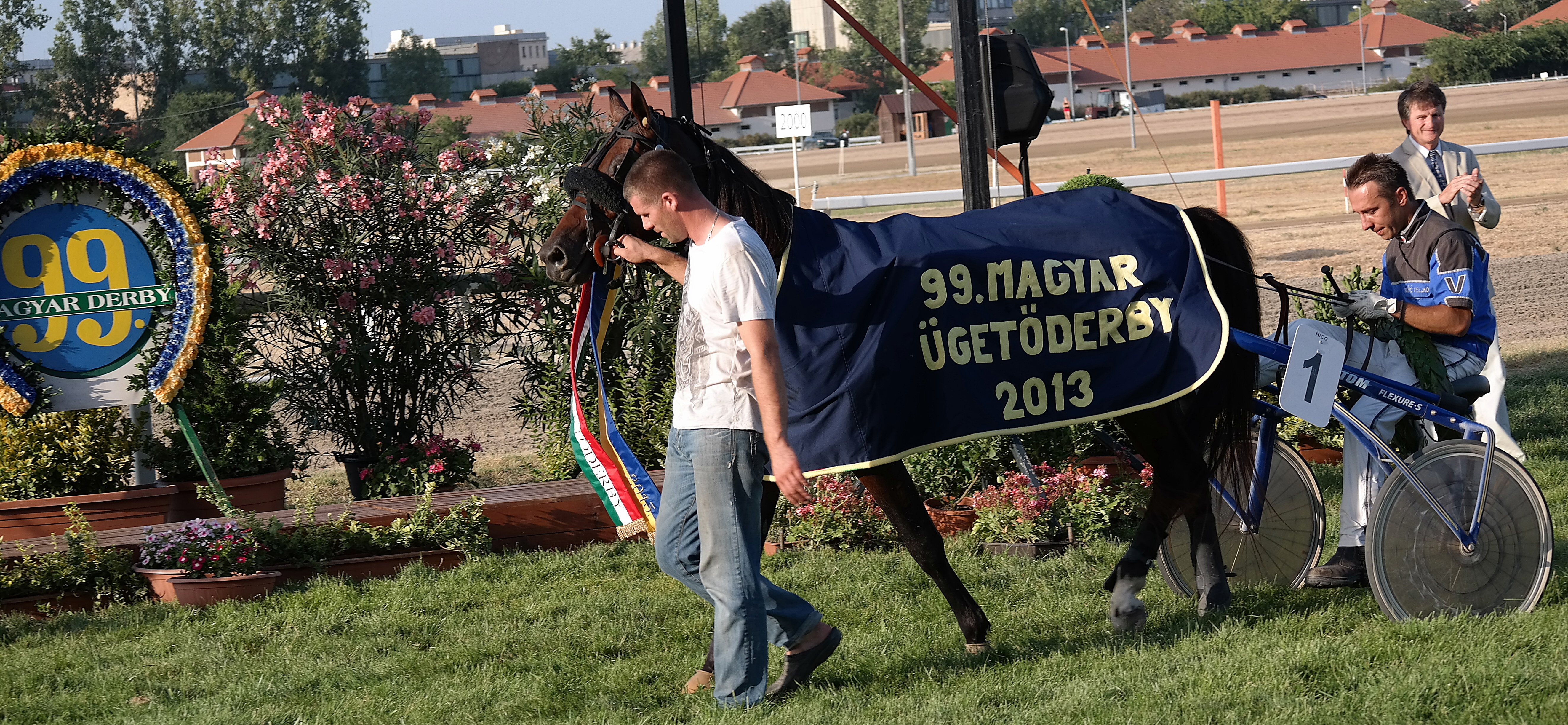 A 2013-as Ügetőderby győztes lova: Radium Boy. Kincsem Park, Budapest.